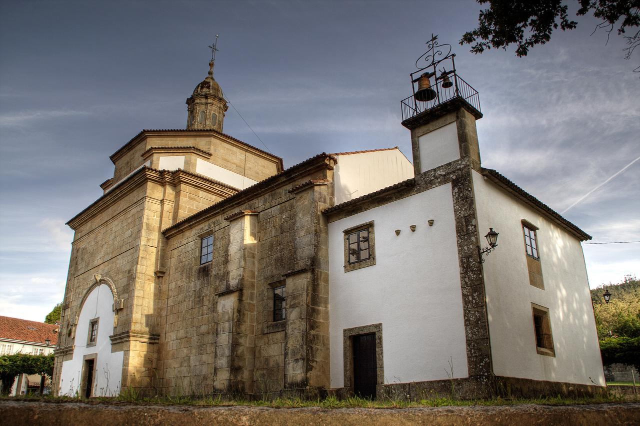 Capela de Santa Minia-Brión-Galicia